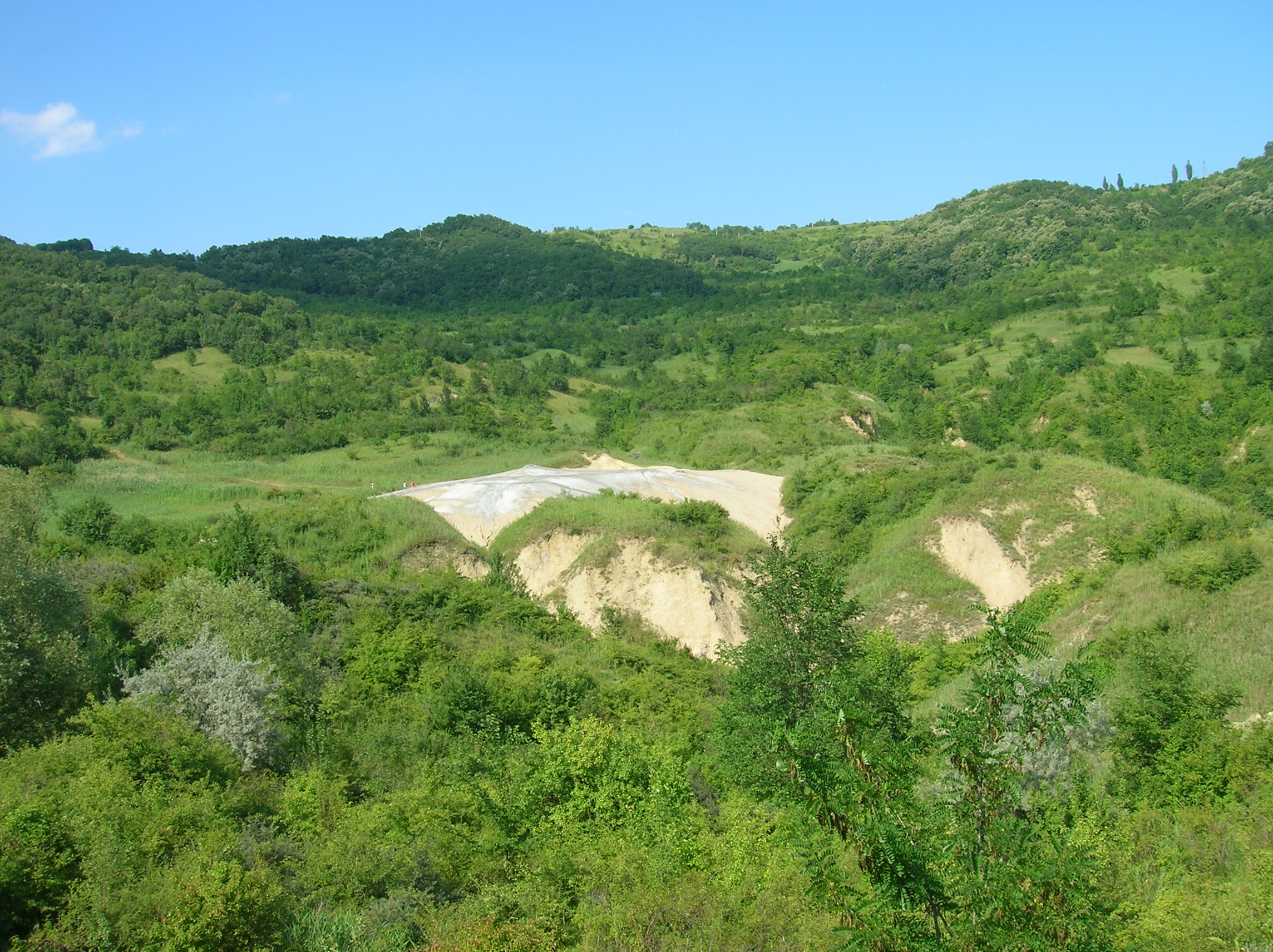 Near village Beciu (Scorţoasa commune)